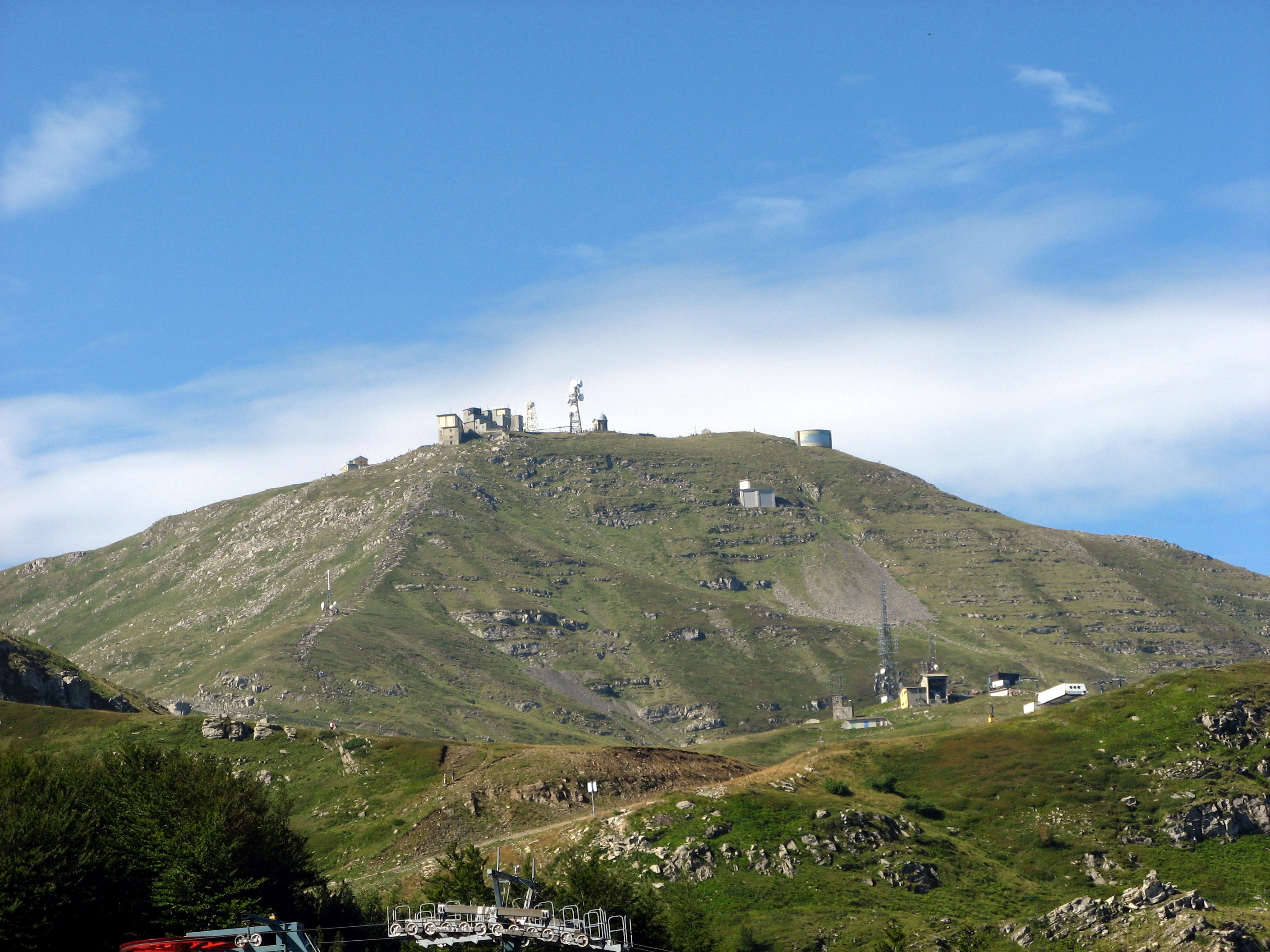 Monte Cimone, Appennini, Italy